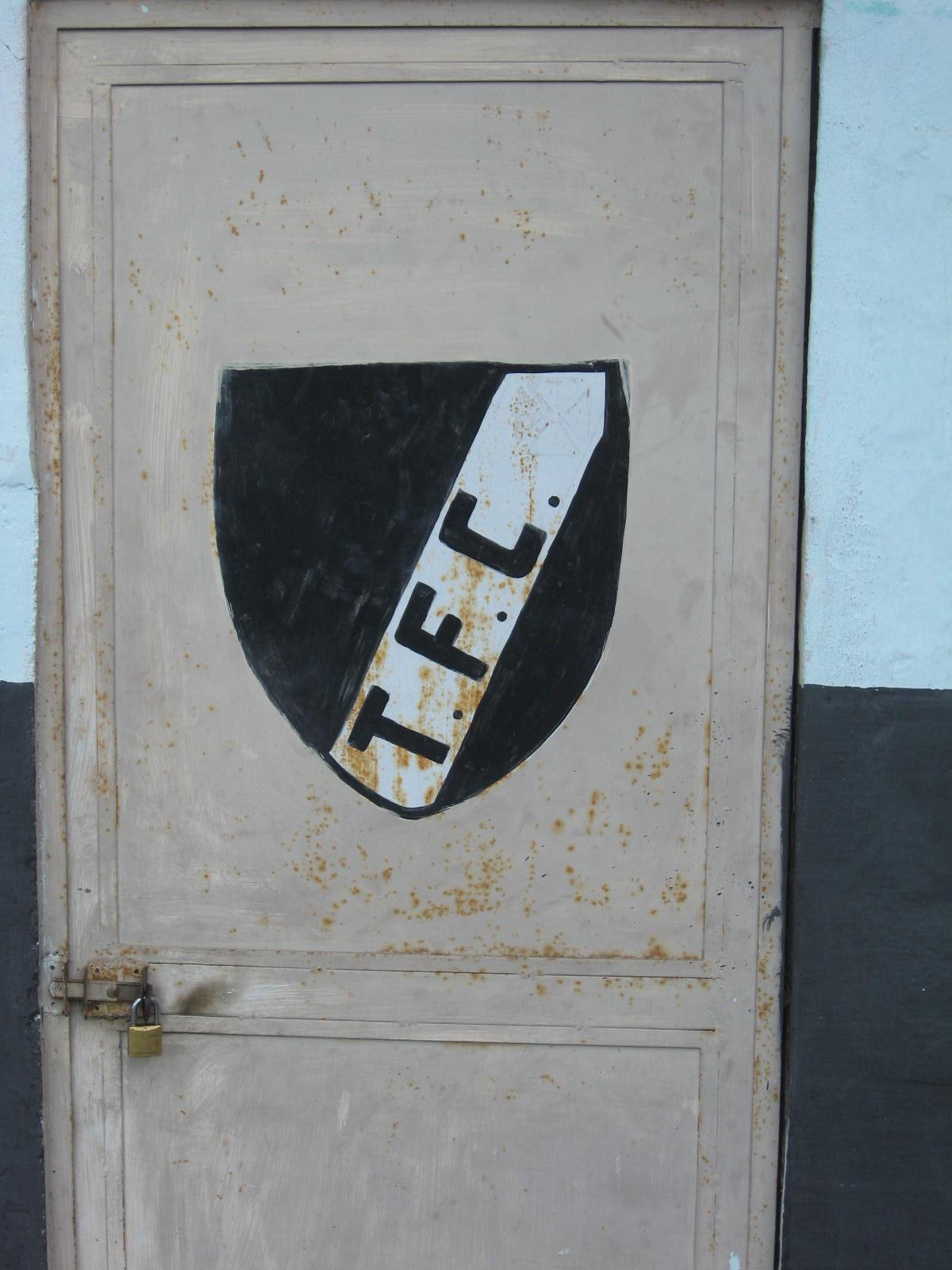 Porta da sala de troféus do Tomazinho FC